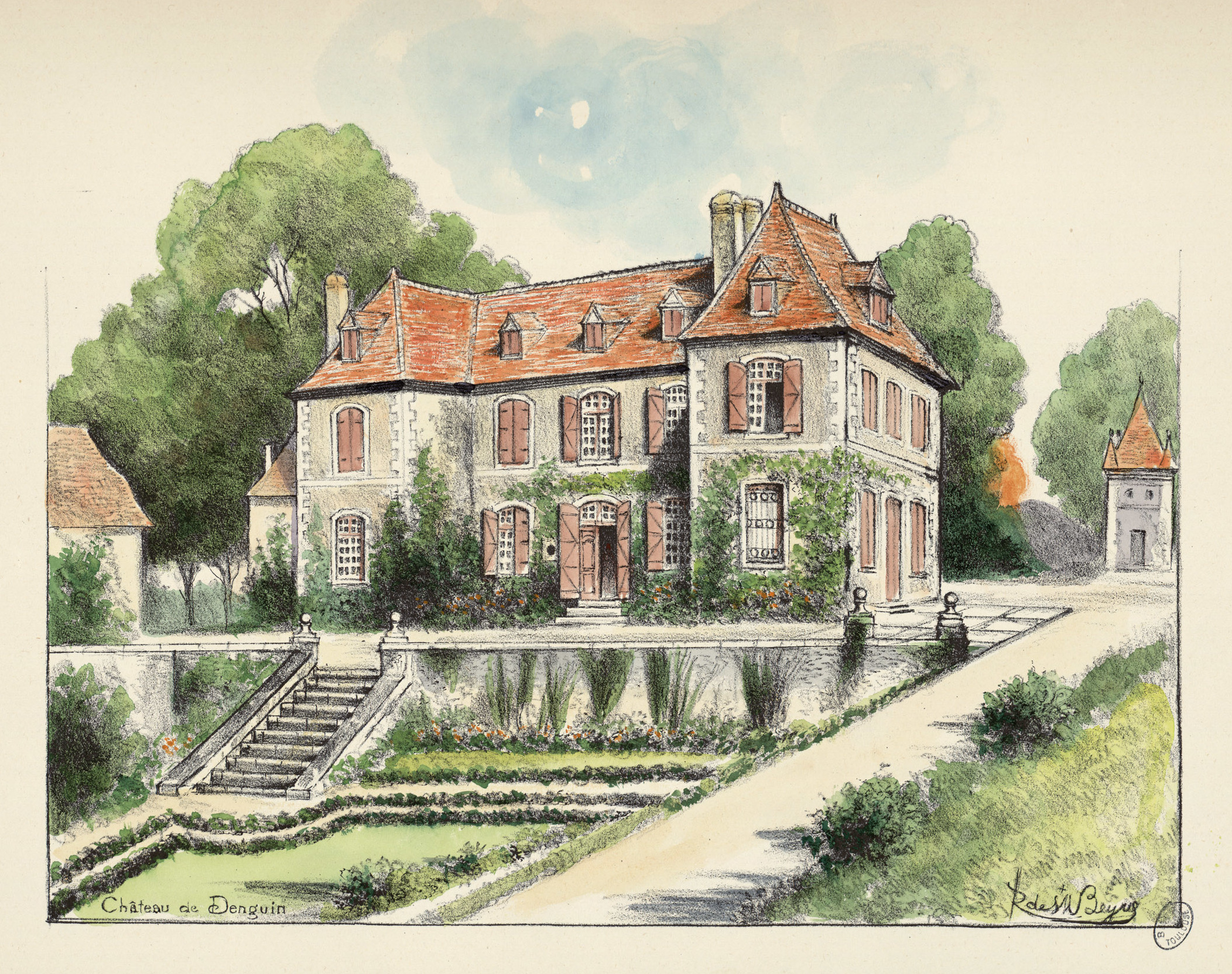 Ancely, René (1876 - 1966). Possesseur